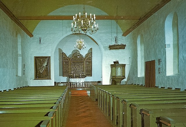 Vereide kirke